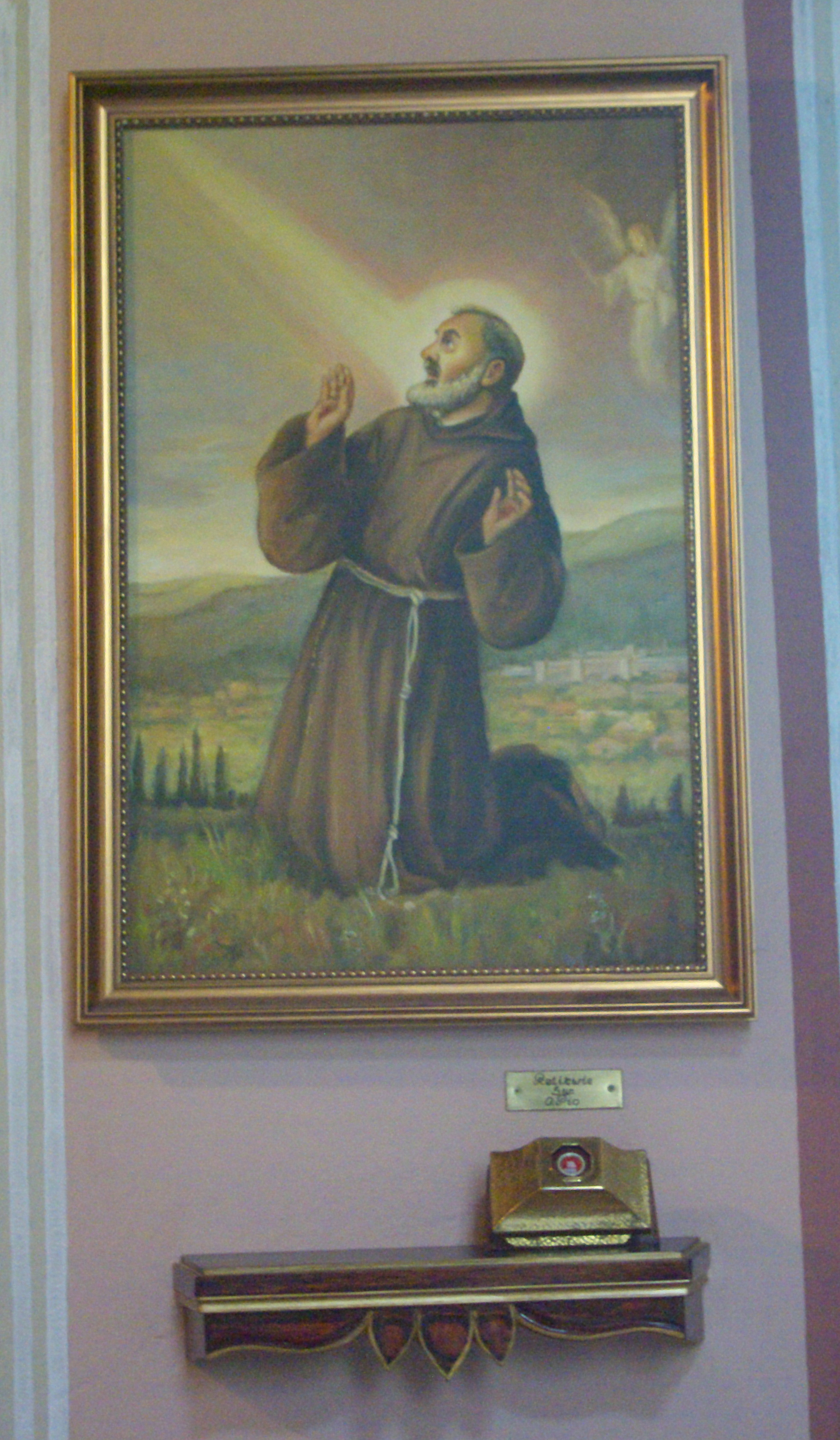 Obraz Ojca Pio w kościele Przemienienia Pańskiego w Brzozowie